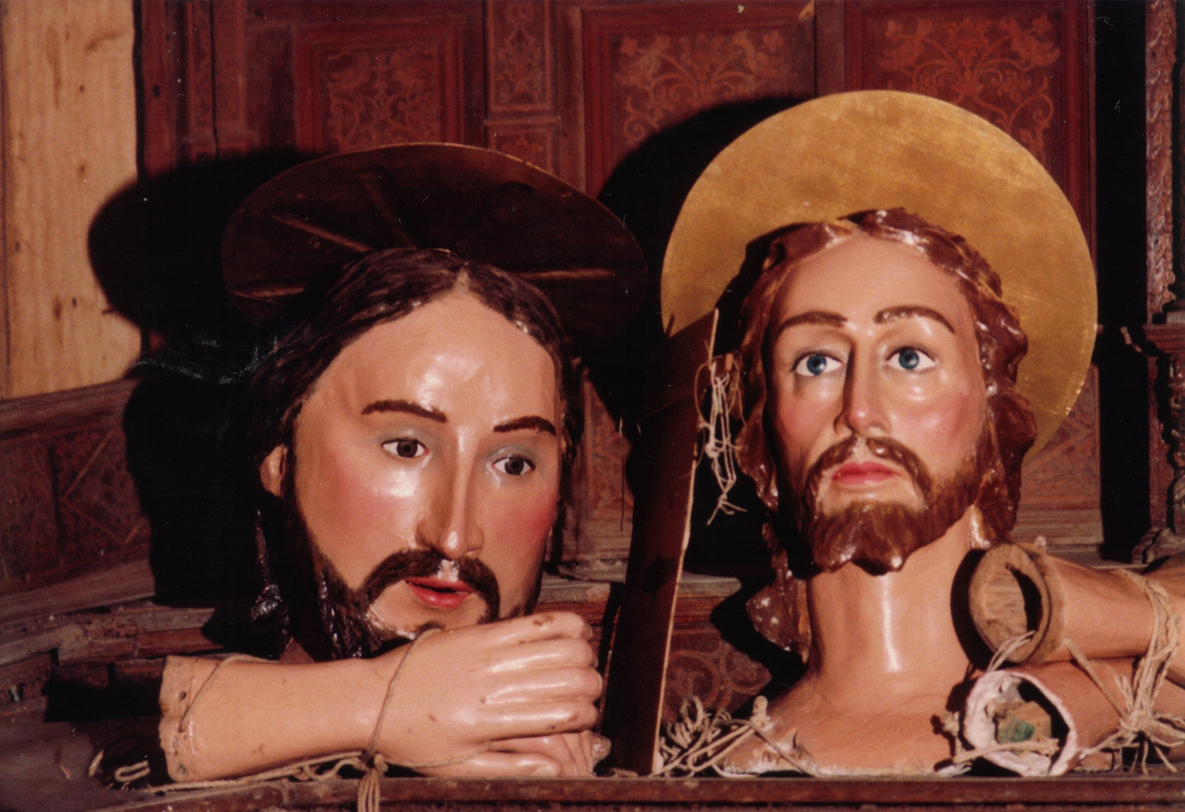 Aidone (EN_Sicilia): acroliti dei "Santoni", statue in cartapesta e legno dal busto cavo dove si in infila il portatore, nell'insieme raggiungono quasi i tre metri di altezza